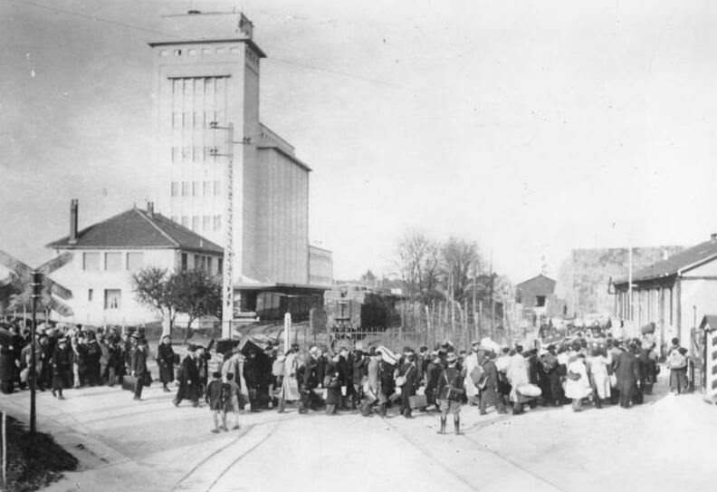 Frankreich, Internierungslager Pithiviers 1941, Eingang zum Internierungslager für Juden bei Pithiviers im Departement Loiret (Frankreich): Die Ankunft von Juden zum Lager 10 000-41